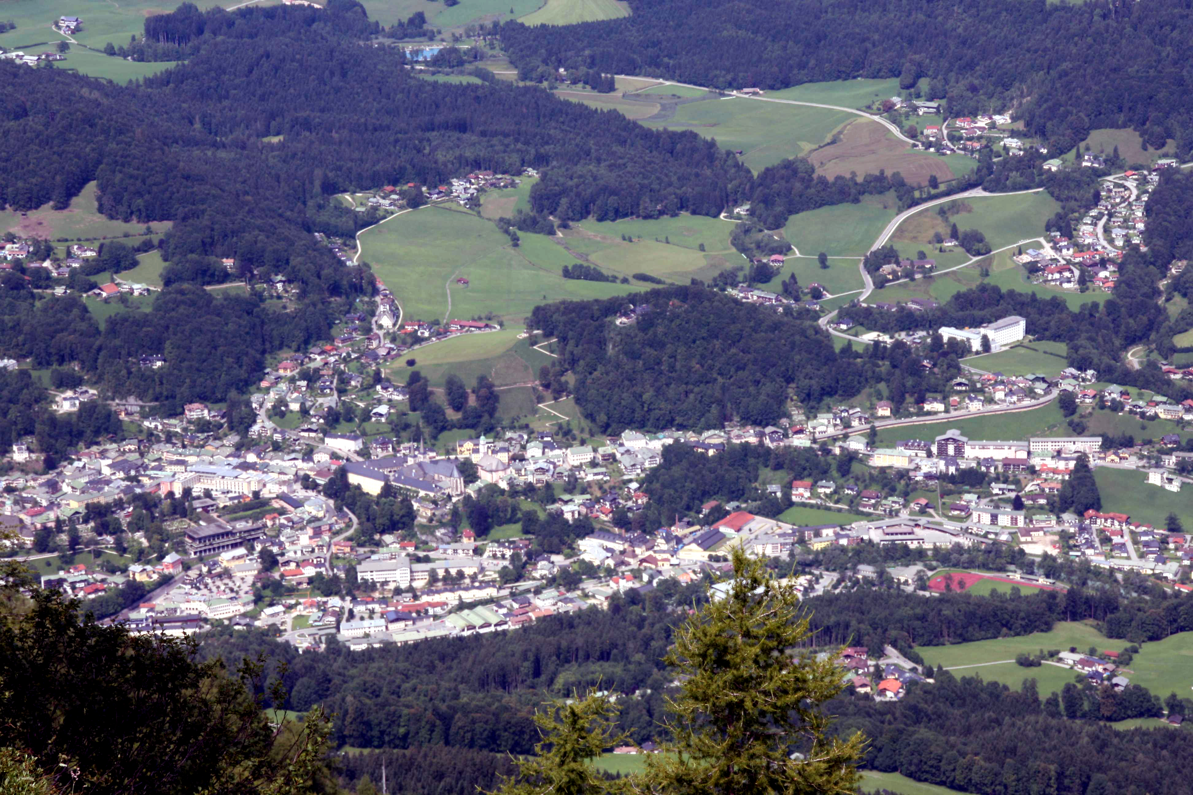 Berchtesgaden vom Kehlsteinhaus aus gesehen